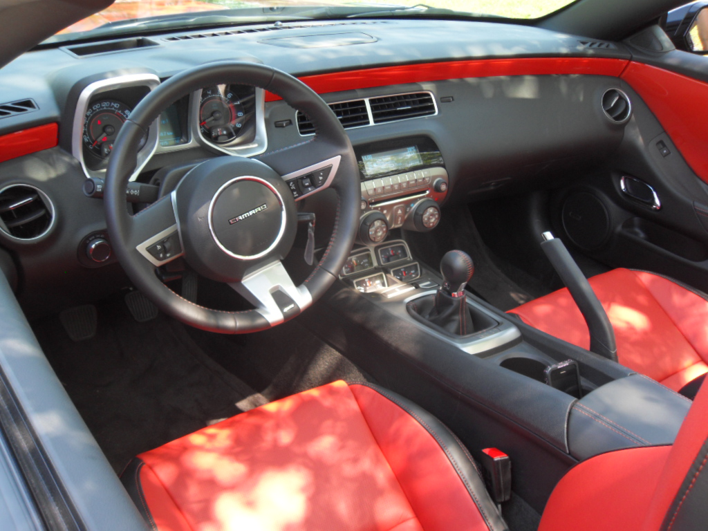 Interior